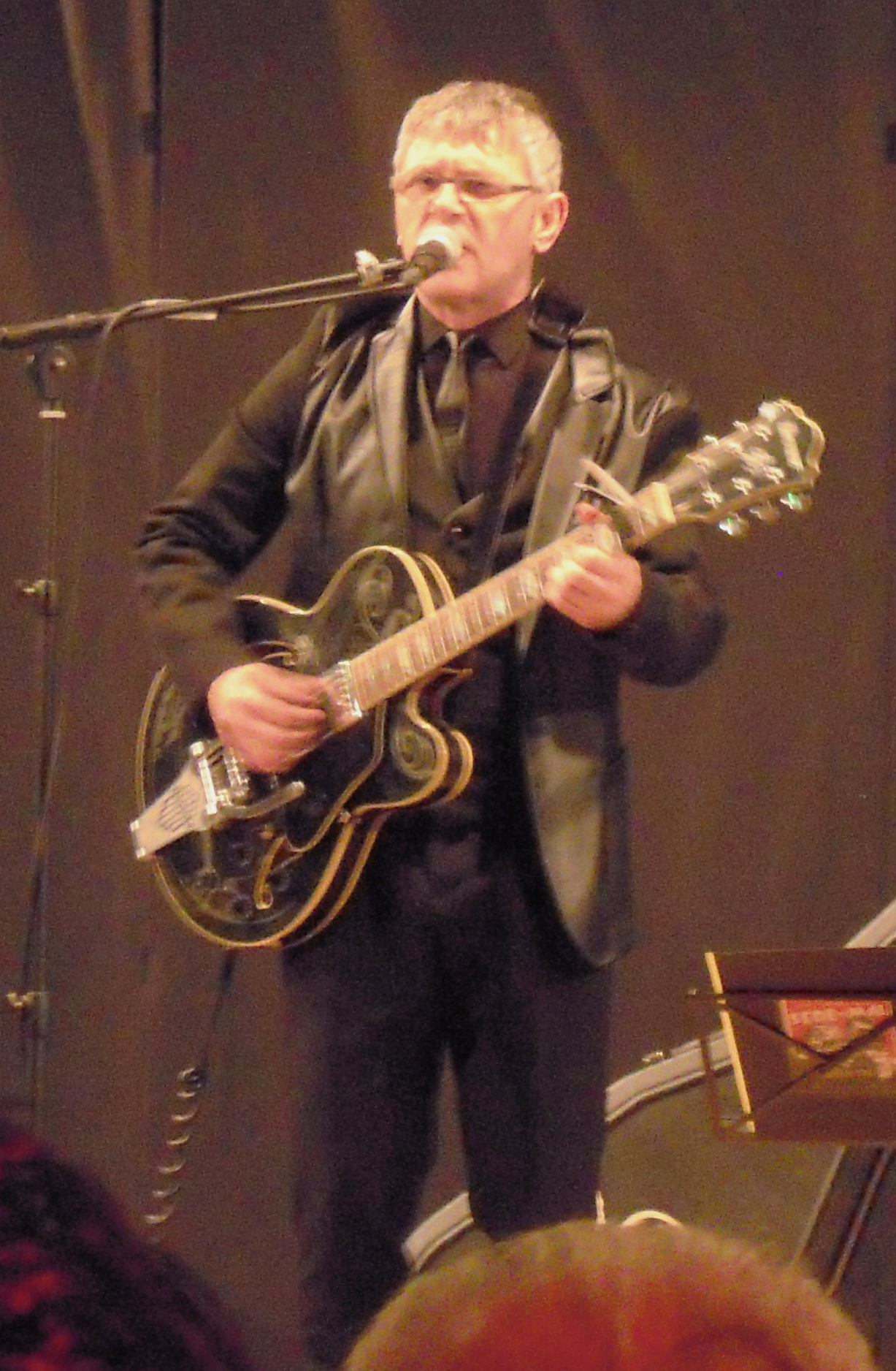 Luís Iglesia na comedia Sede de mal en Mourente (Pontevedra)